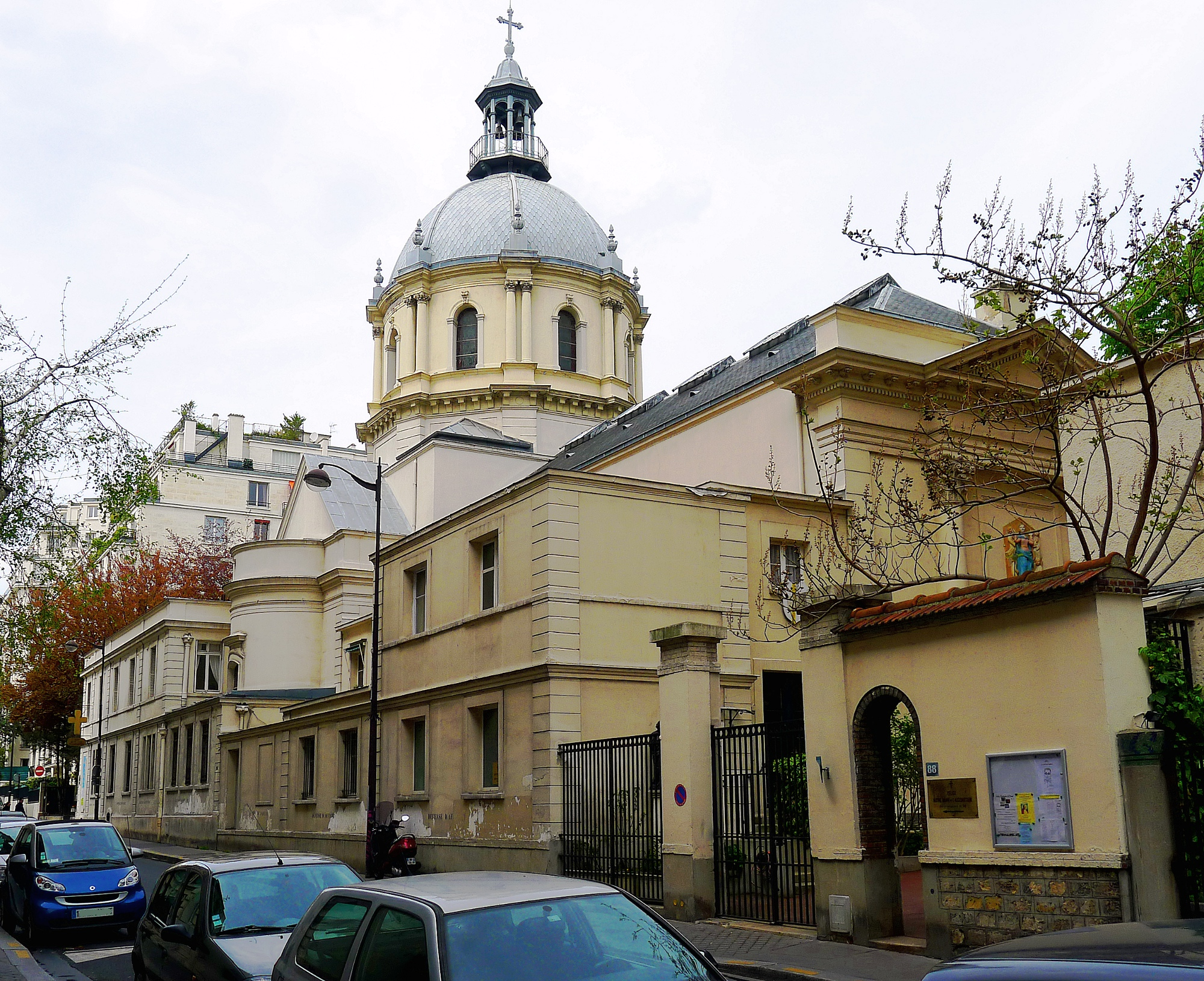 Église Notre-Dame-de-l'Assomption-de-Passy - Paris XVI